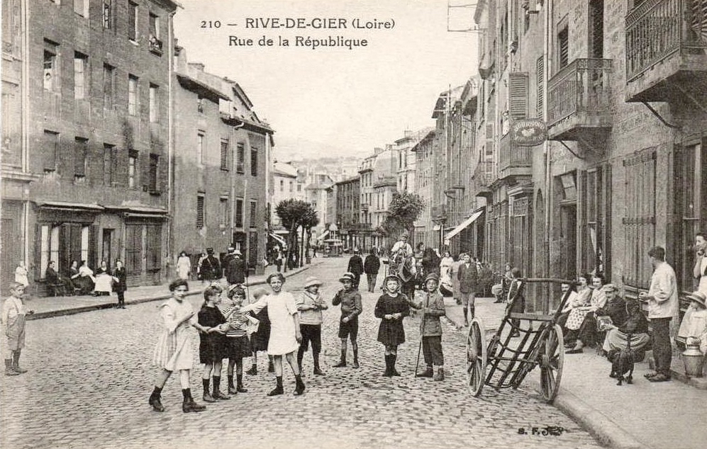 Rive-de-Gier, rue de la République, vers 1905/1910.